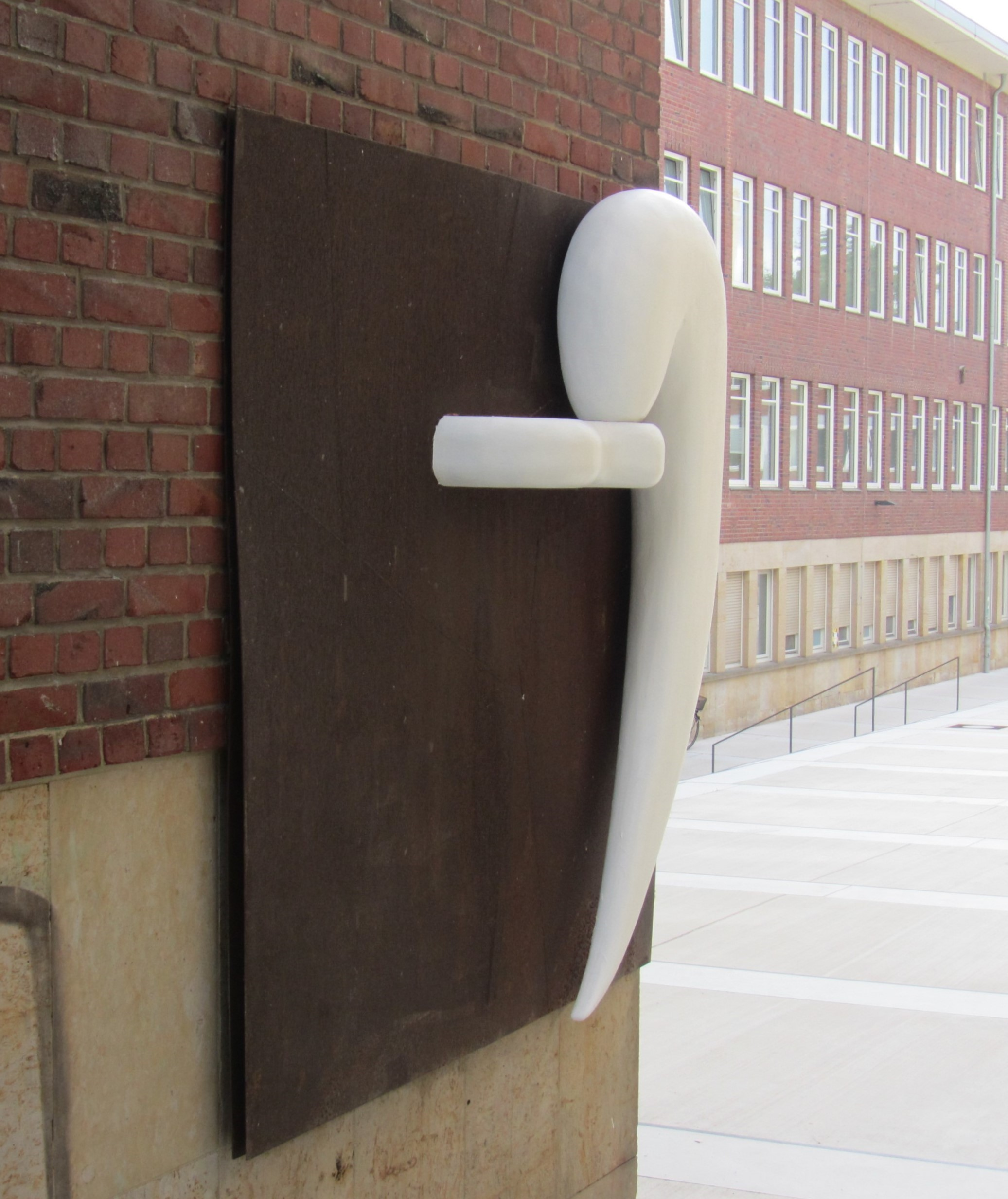 Richard Tuttle: Art and Music I, 1987, Stahl und Holz, 200 x 200 x 30 cm, Standort: Münster, Domplatz/Fürstenberghaus, einer von zwei Teilen einer Skulptur im Rahmen der "Skulptur.Projekte 1987", Münster